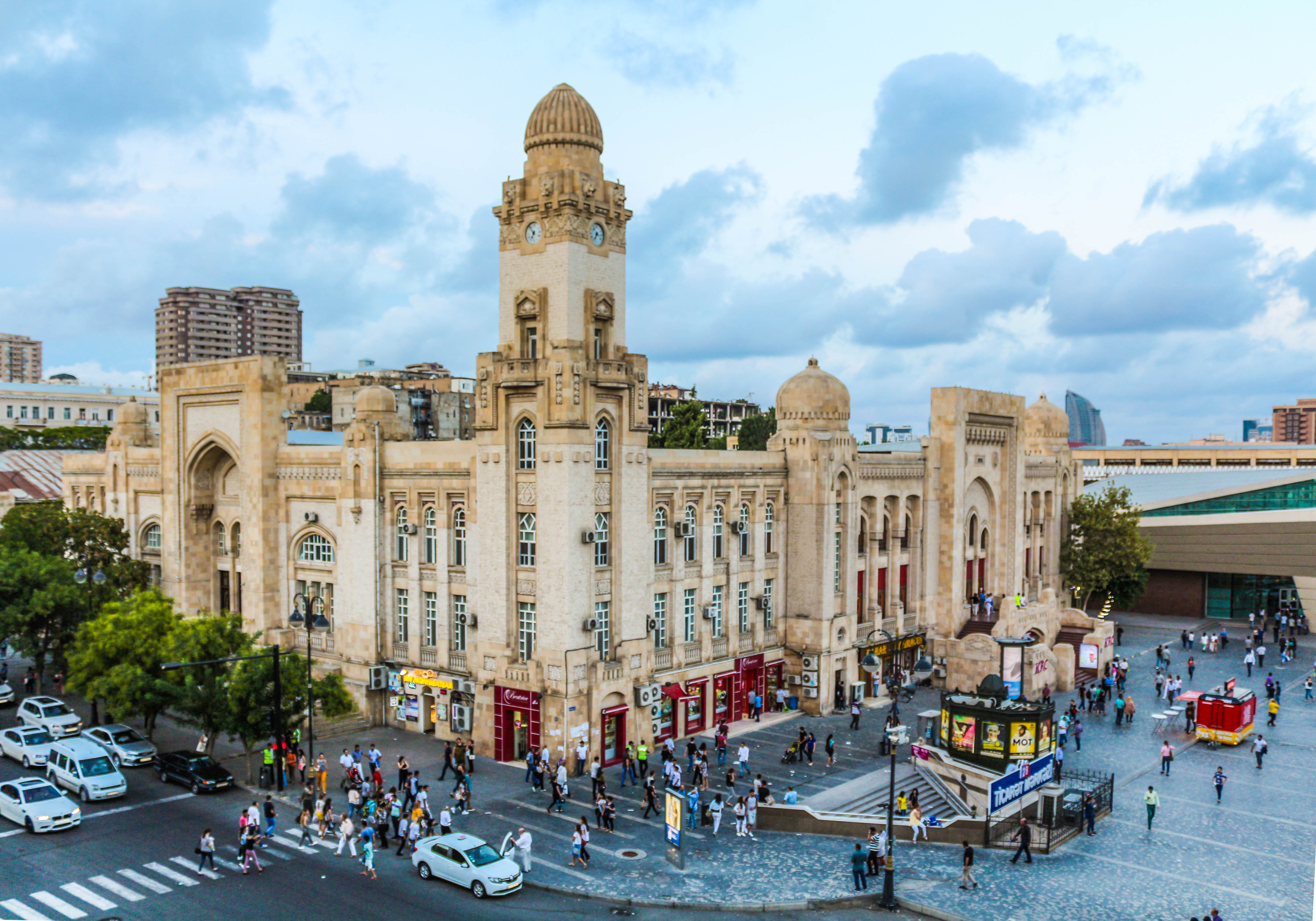 Elektrik dəmiryol vağzalının binası